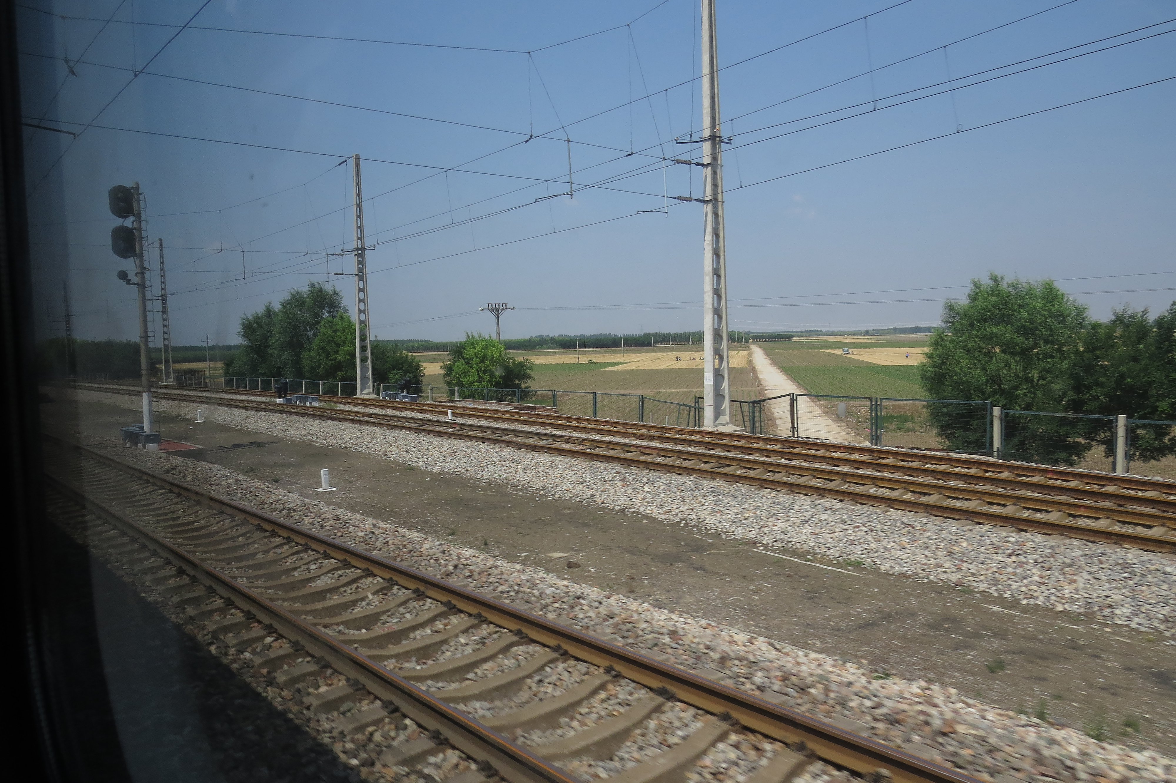 河间西站北咽喉